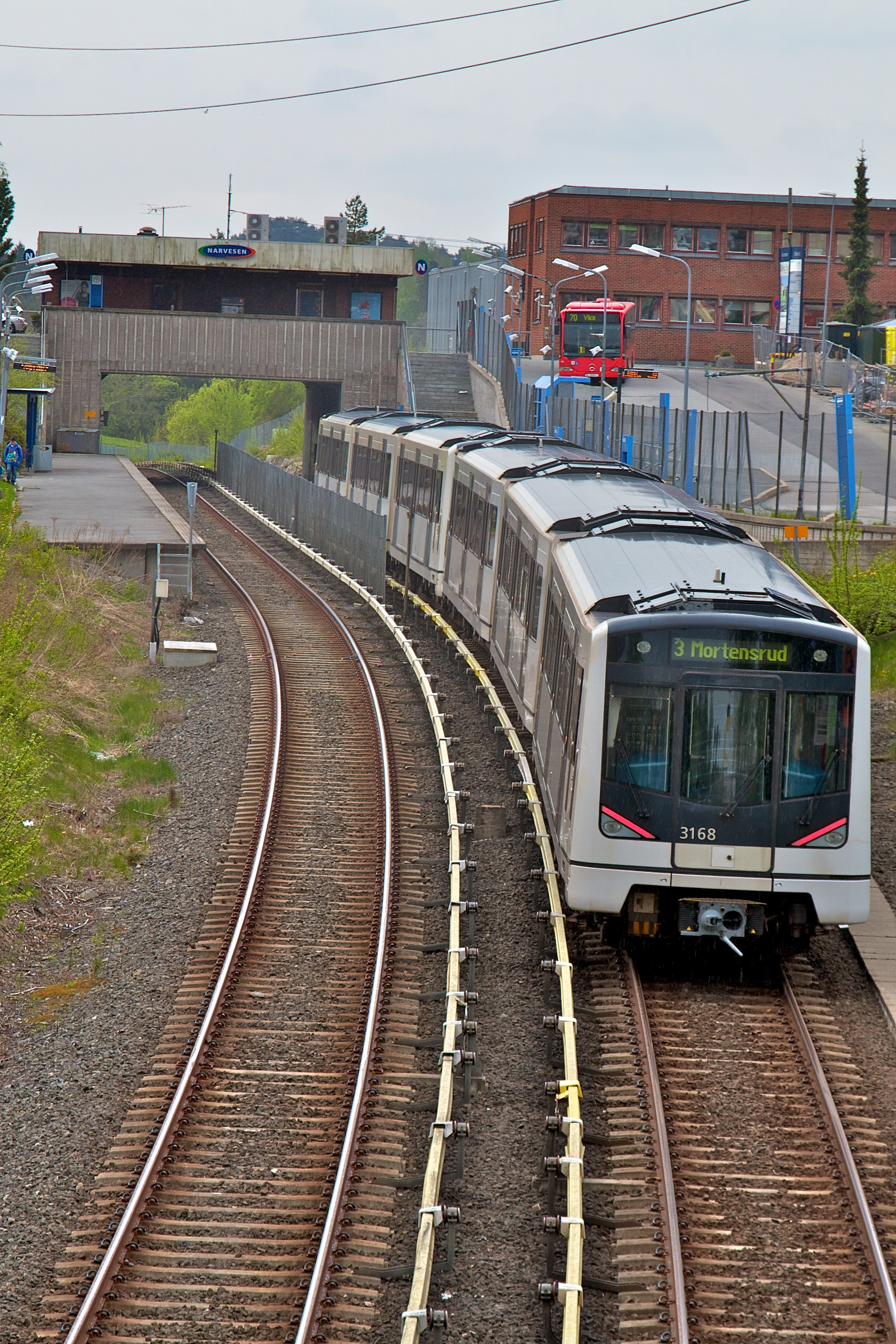 MX3000 ved Skullerud stasjon